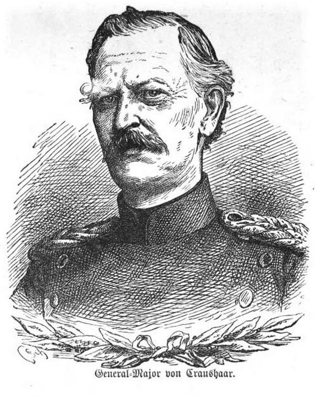 Ernst Adolf von Craushaar (1815–1870), sächsischer Generalmajor